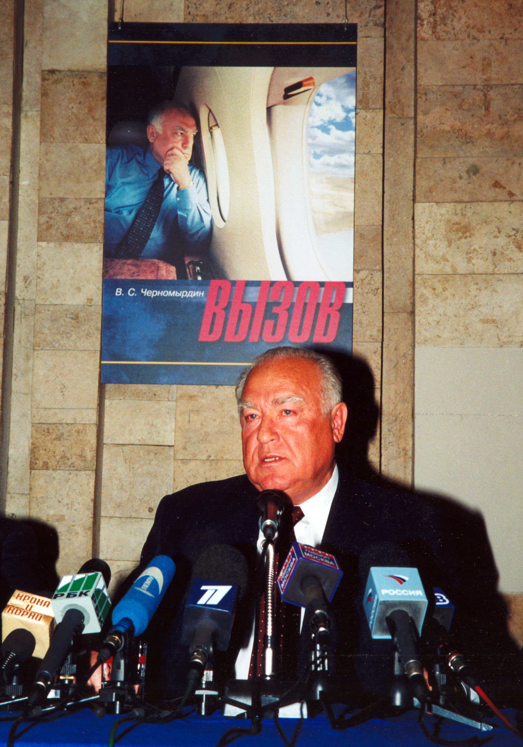 17 ноября 2003 г. Москва. Зал для пресс-конференций ИТАР-ТАСС. В. С. Черномырдин представляет свою книгу «Вызов».